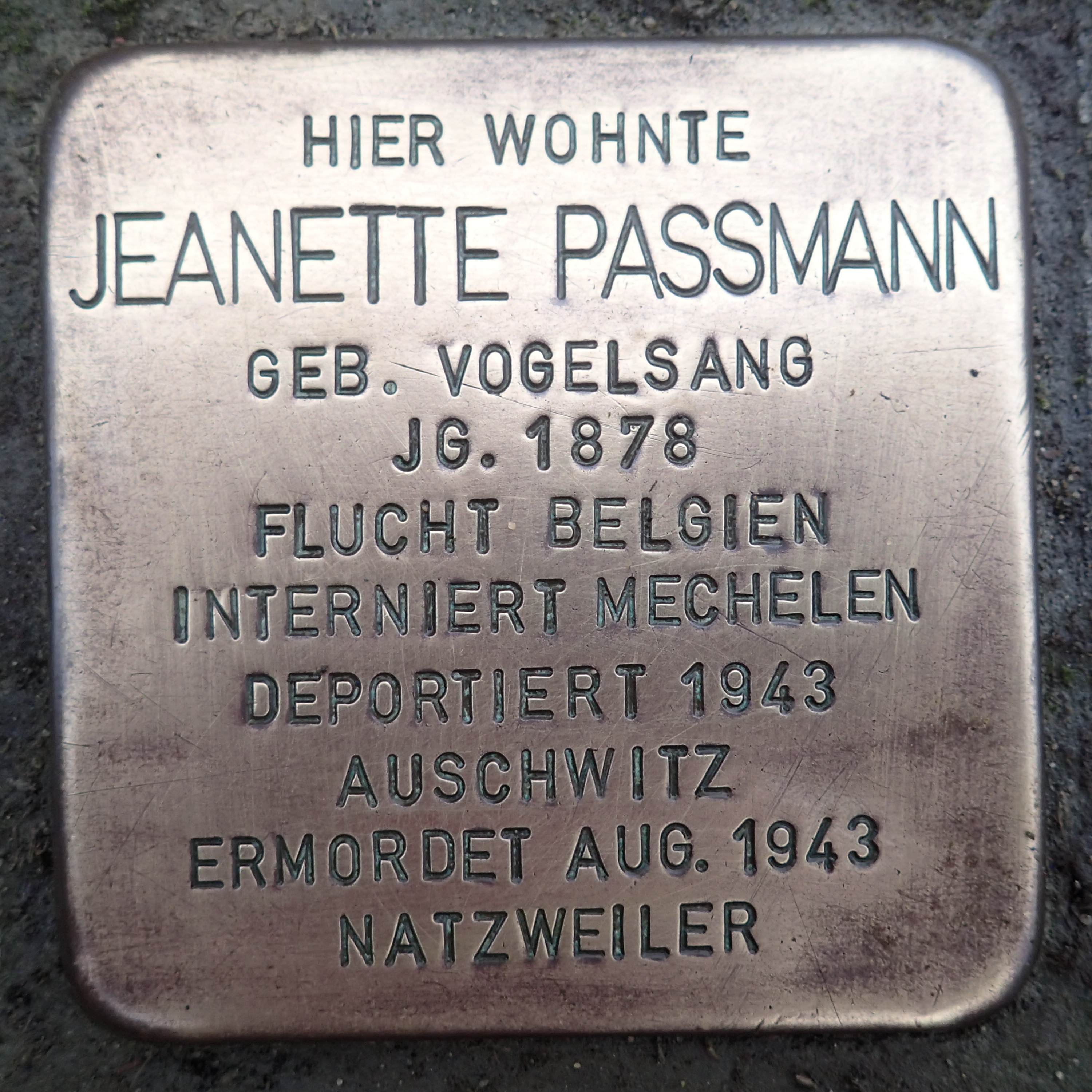 Stolperstein Geldern Harttor 24 Jeanette Passmann